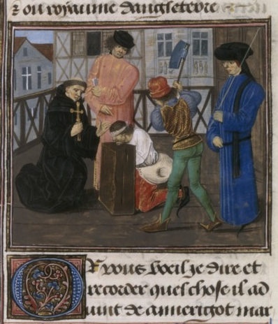 Exécution de Aimerigot Marchès.